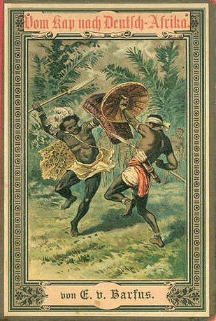 Vom Kap nach Deutsch-Afrika. Streifzüge nach einem Verschollenen. Der reiferen Jugend erzählt von E. v. Barfus. Mit vier Farbendruckbildern nach Aquarellen von G. Franz. Stuttgart, K. Thienemanns Verlag, Gebrüder Hoffmann. (1888).